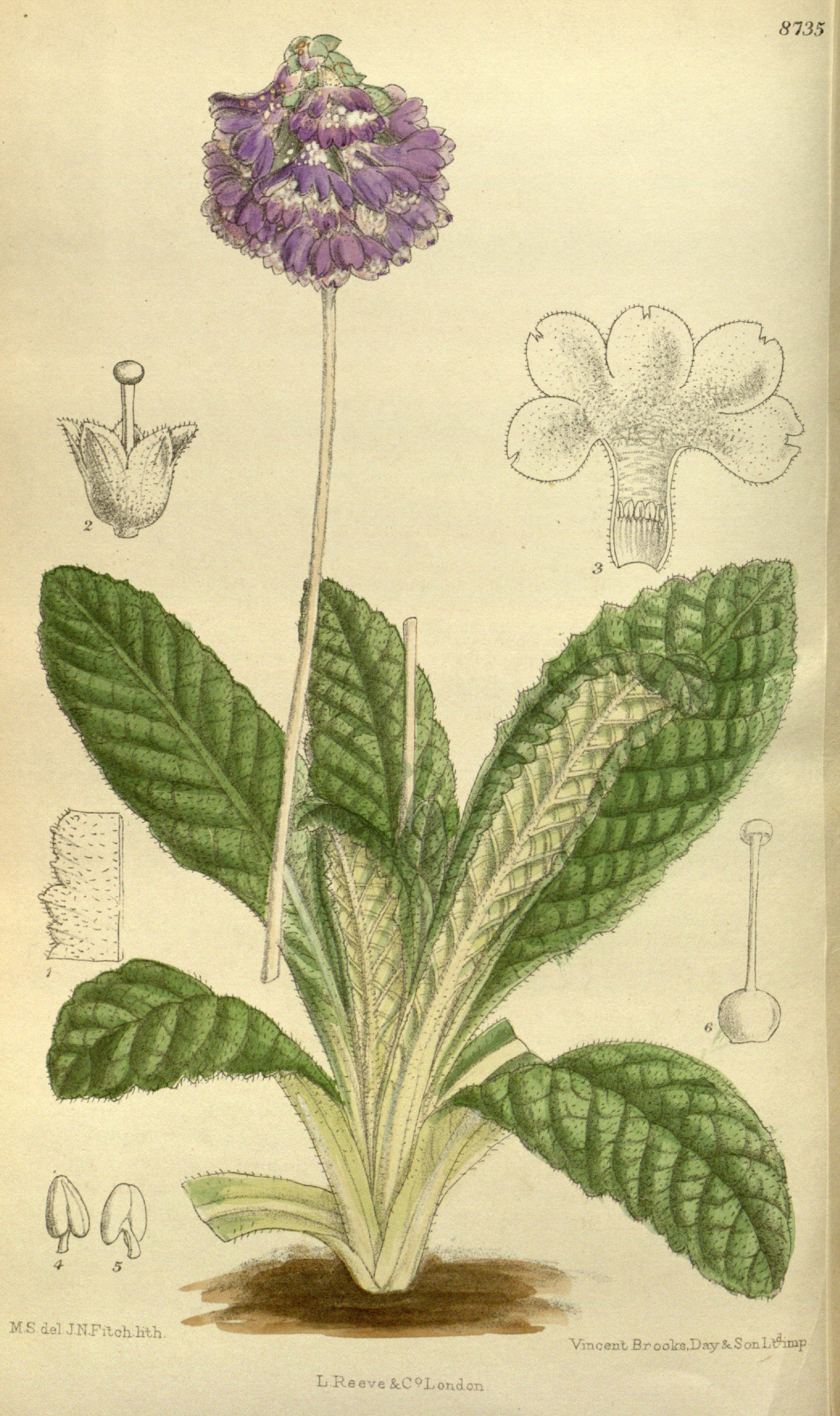 Primula nutans (= Primula flaccida), Primulaceae